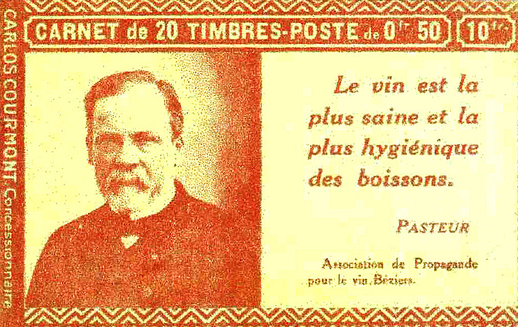 Carnet de 20 TP Semeuse lignée à 0fr50 à l'effigie de Louis Pasteur d'après une photo de Félix Nadar